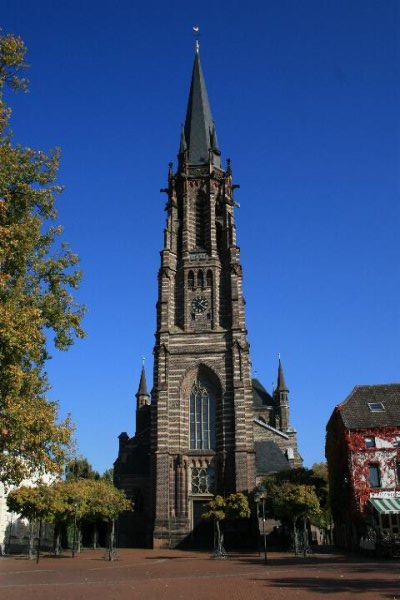 Denkmal Nr. 50 in Schwalmtal-Waldniel